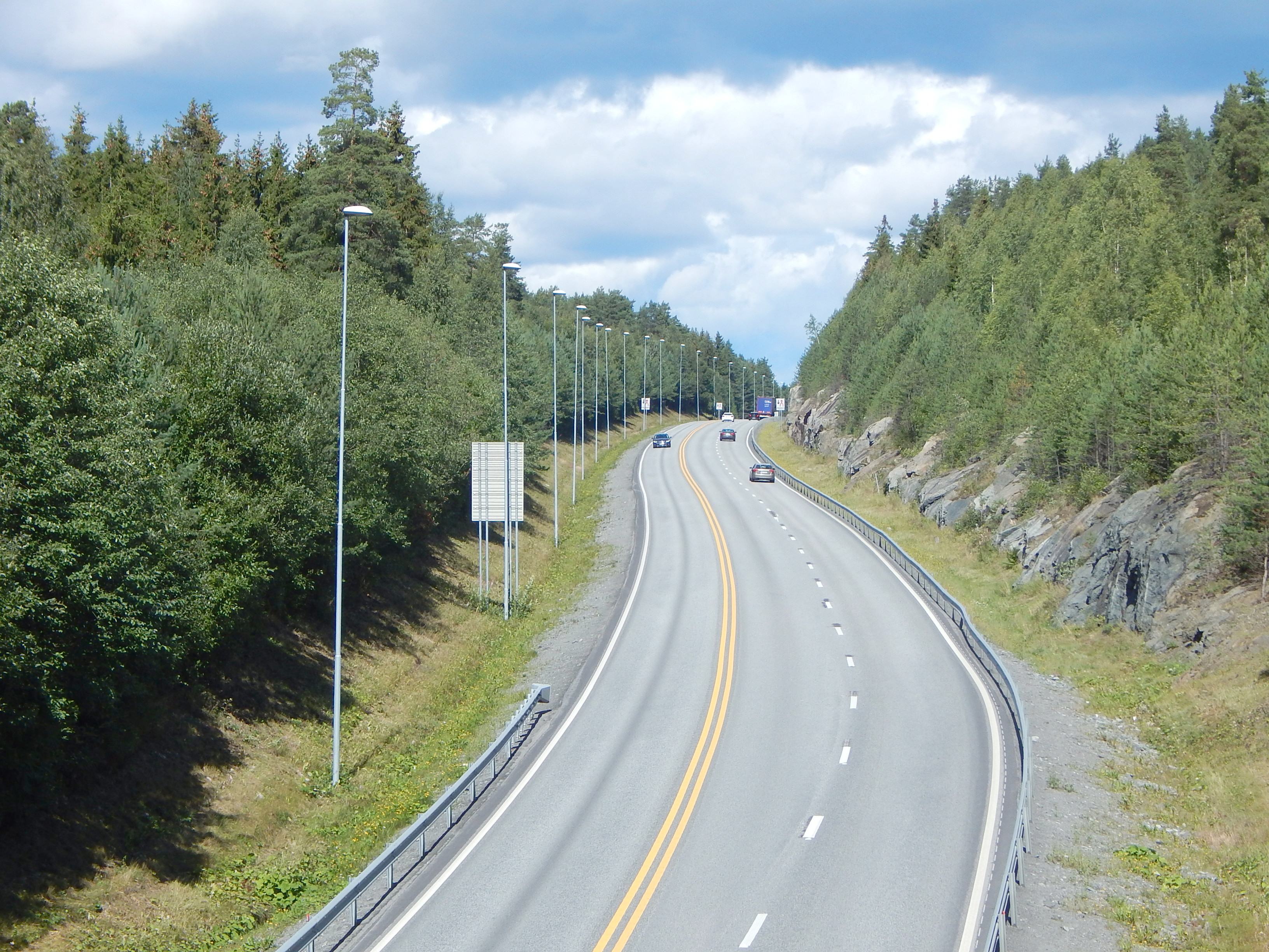 Riksvei 3 like nord for fylkesvei 238